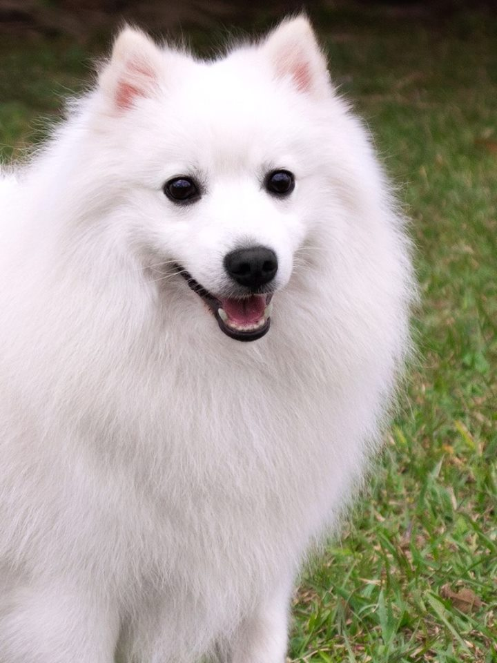 Bruno, meu spitz japones